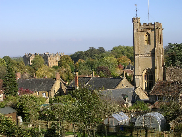 Montacute